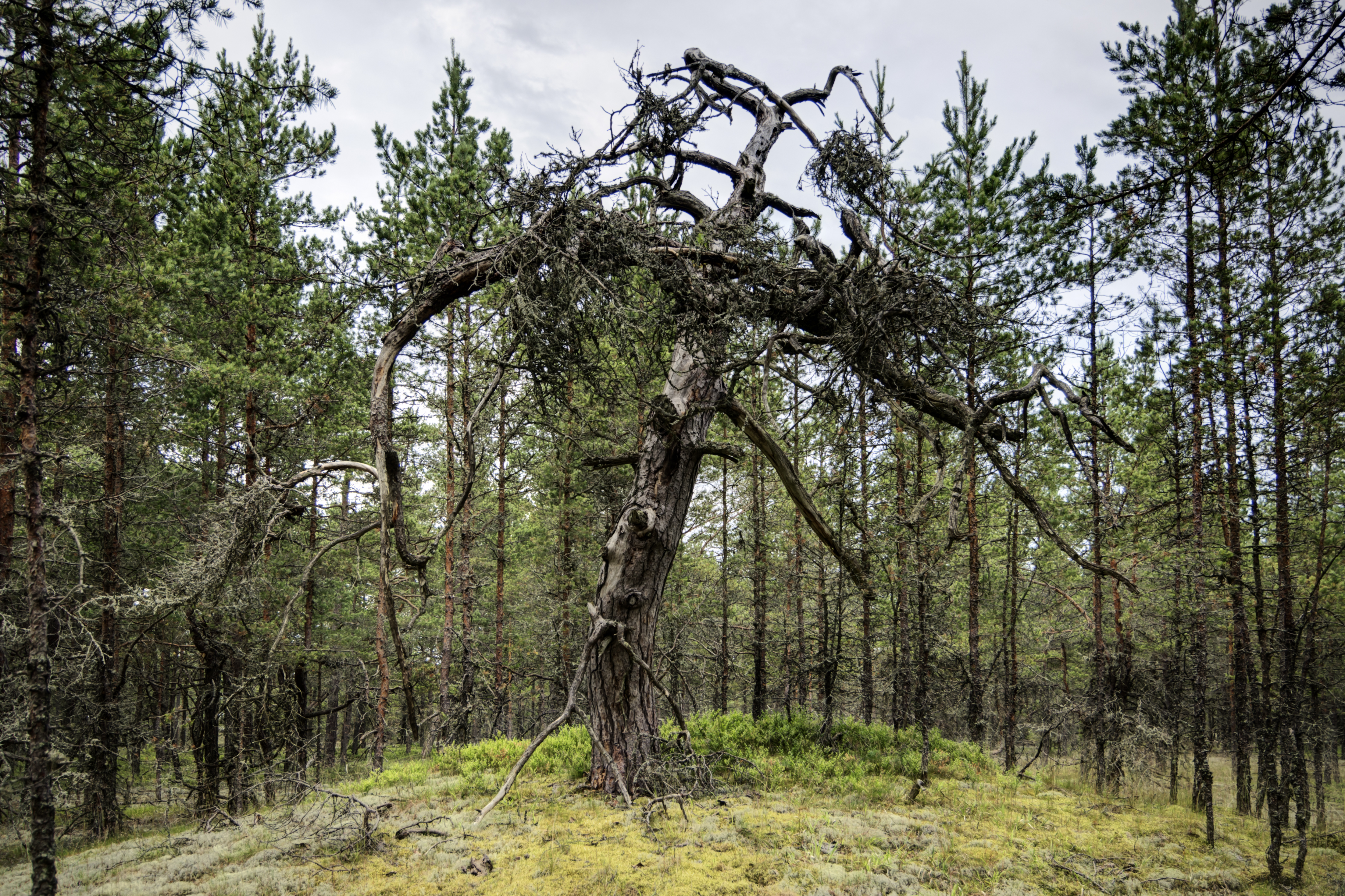 Vana mänd Nõva rannikumetsas.